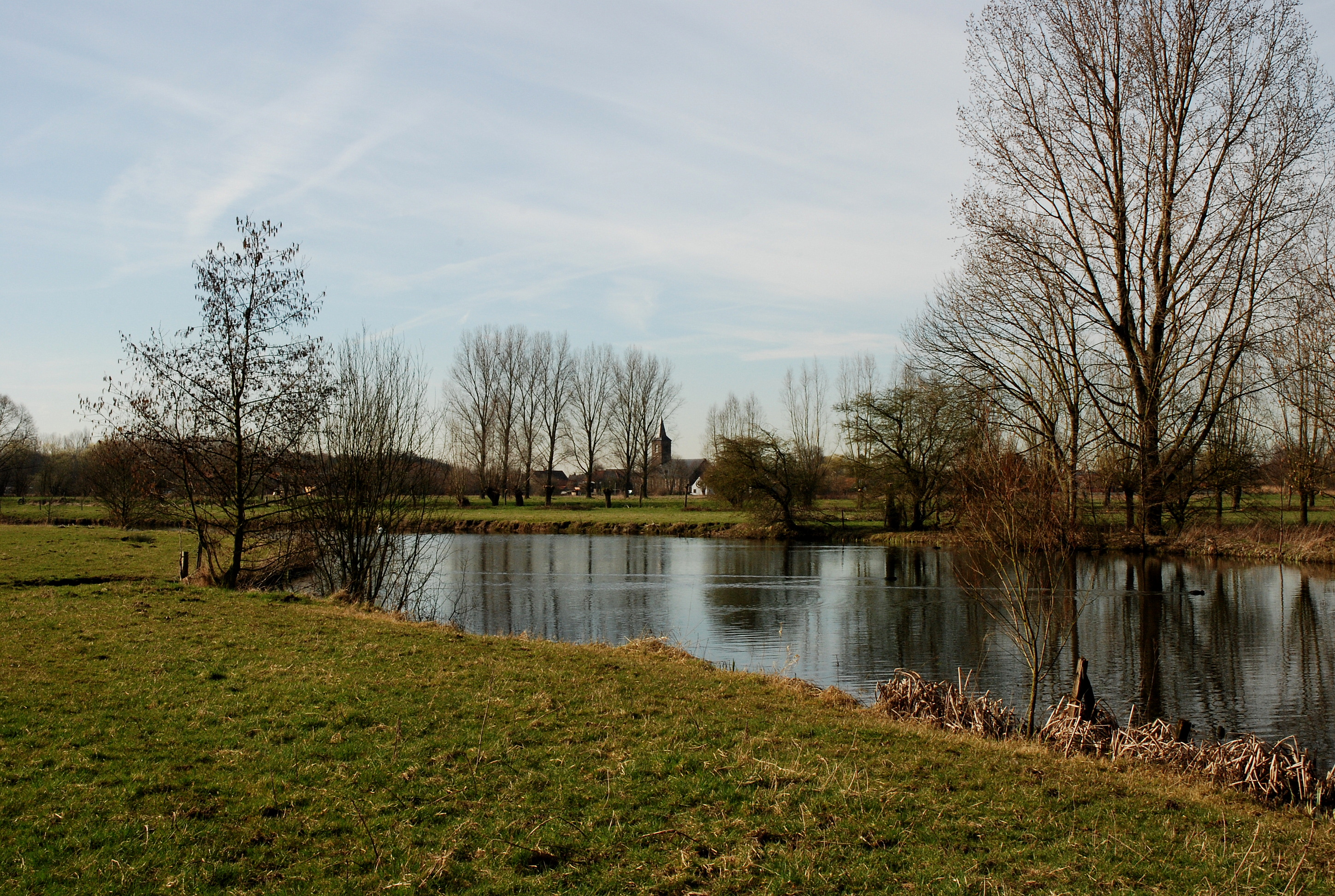 Zevergem, België